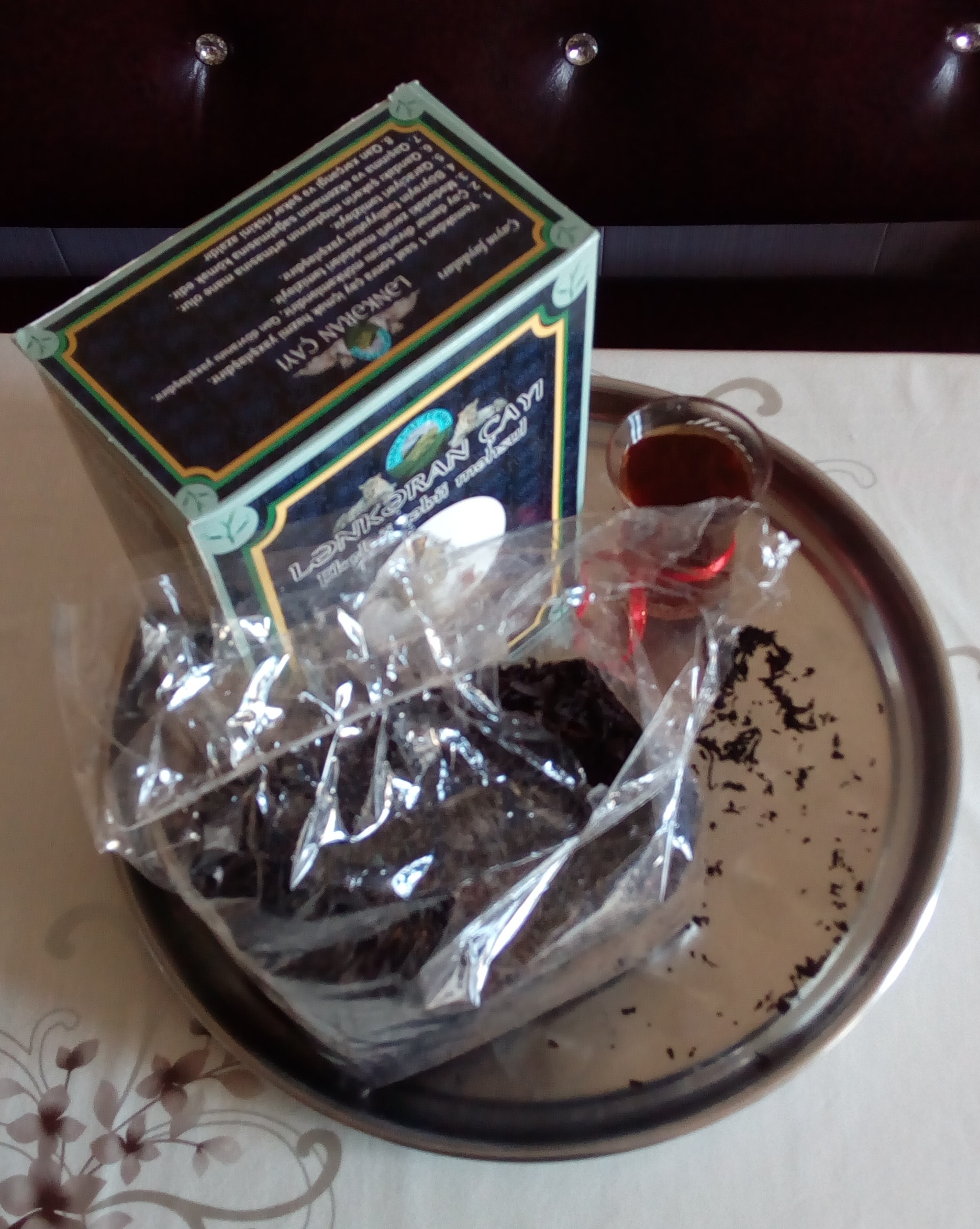 Lənkəran çayı